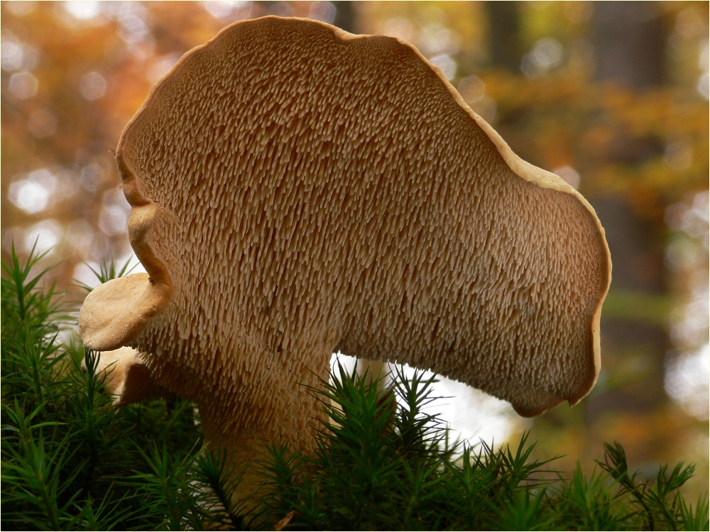 Semmelstoppelpilz (Hydnum repandum)